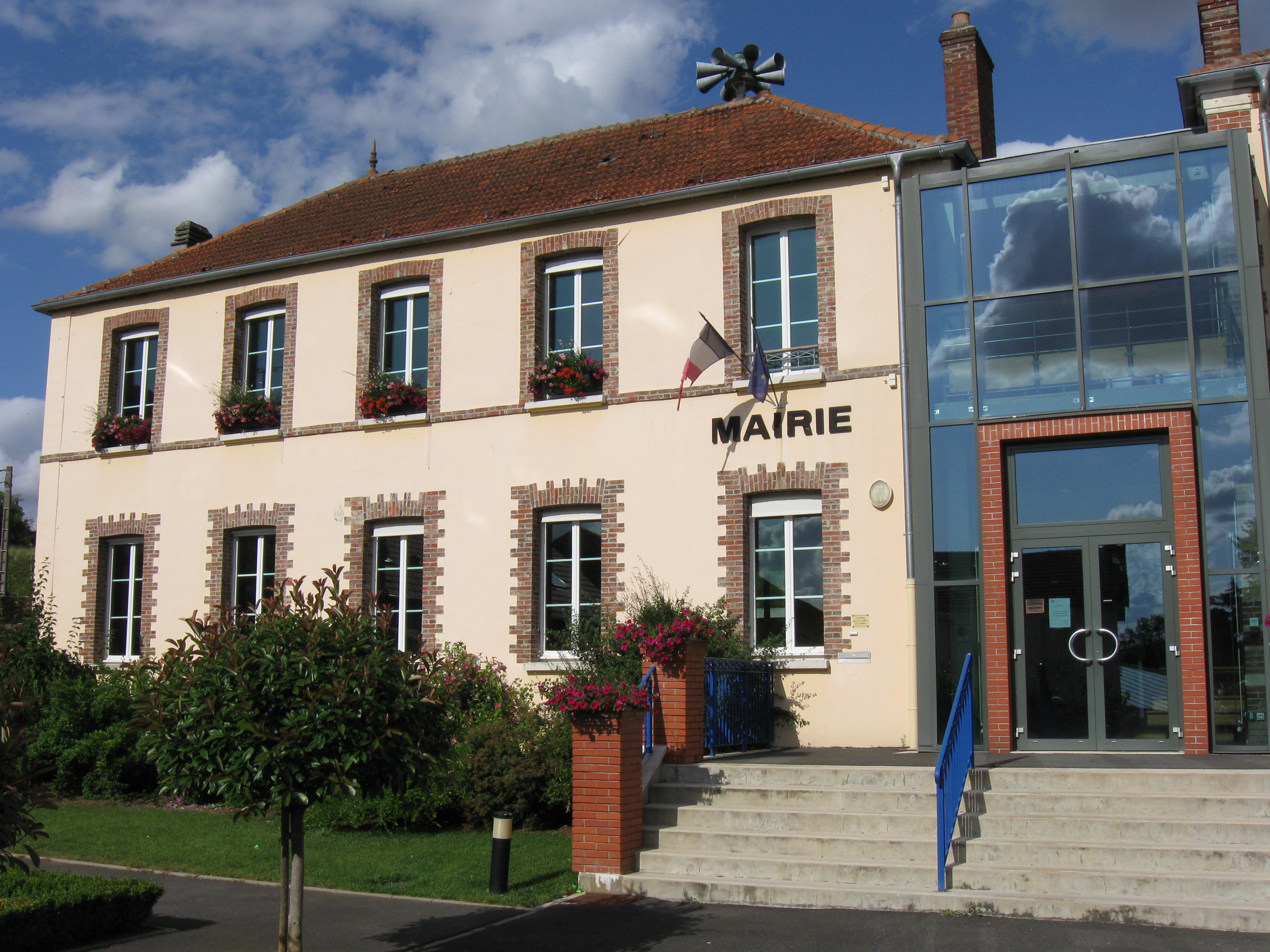 Mairie de Longueville. (département de la Seine et Marne, région Île-de-France).